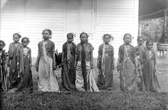 Repronegatief. Patudu's (dochters van vorsten en adellijken) te Mamuju, Sulawesi.